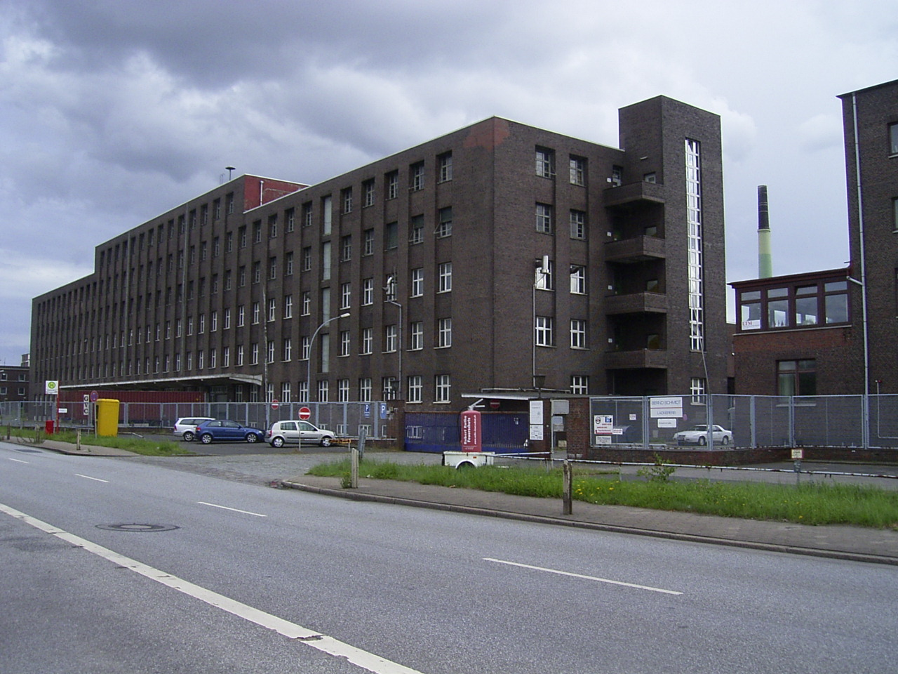 Die ehemalige chemische Fabrik der GEG in der Peutestraße auf der Veddel wurde 1925-27 von der Bauhütte Bauwohl erbaut.